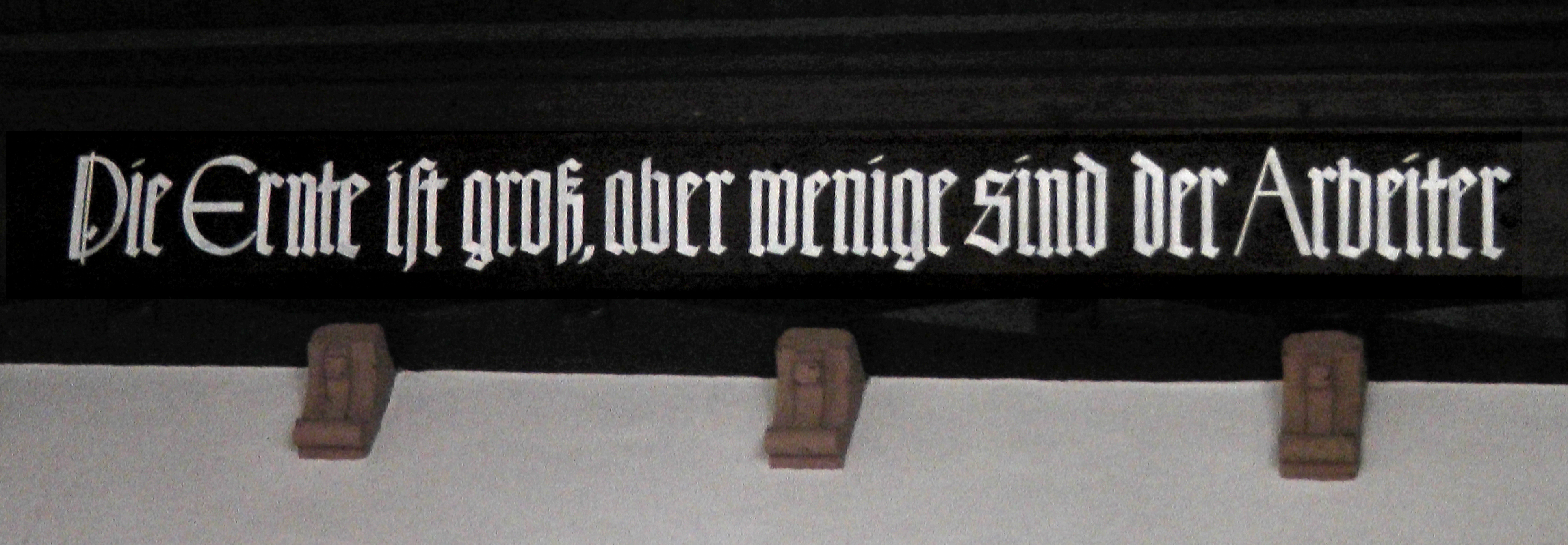 Evangelische Kirche Saarburg Schriftzug